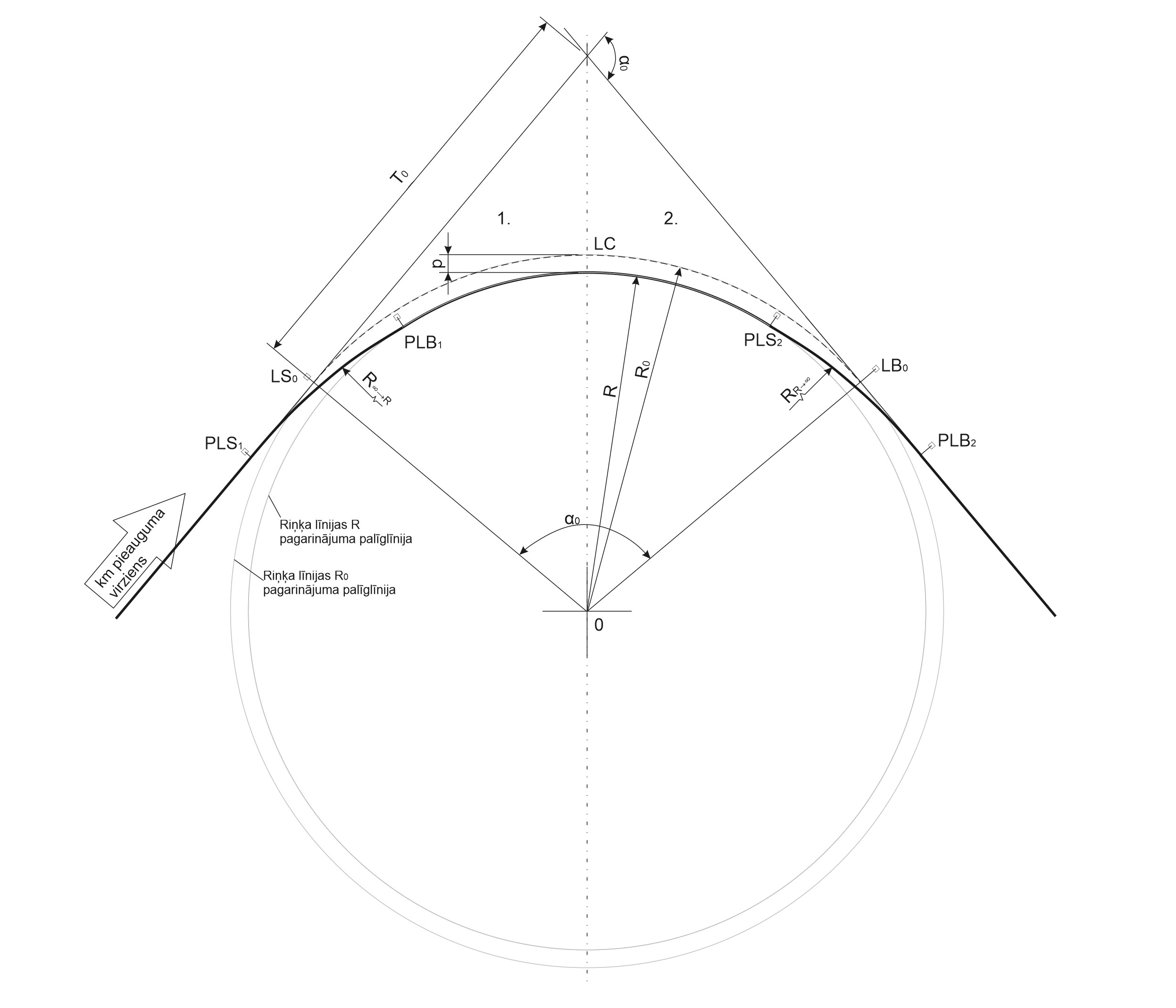 Līknes uzbūves shēma: PLS1 ÷ PLB1 – 1.pārejas līknes no sākuma līdz beigām, kad notiek nepārtraukta rādiusa maiņa (R∞→R) no ∞ līdz nemainīgam lielumam R; LS0 – līknes sākums, ja pārejas līknes nebūtu; LC – līknes centrs; PLS2 ÷ PLB2 – 2.pārejas līkne no sākuma līdz beigām, kad notiek nepārtraukta rādiusa maiņa (RR→∞) no nemainīga lieluma R līdz ∞; LB0 – līknes beigas, ja pārejas līknes nebūtu; R – līknes rādiuss, ja ir pārejas līkne; R0 – līknes rādiuss, ja pārejas līknes nav; 0 – riņķa līnijas centrs rādiusiem R un R0; p = R0-R; T0 – līknes tangensa, ja pārejas līknes nav; α0 – līknes pagrieziena leņķis ceļam bez pārejas līknes.